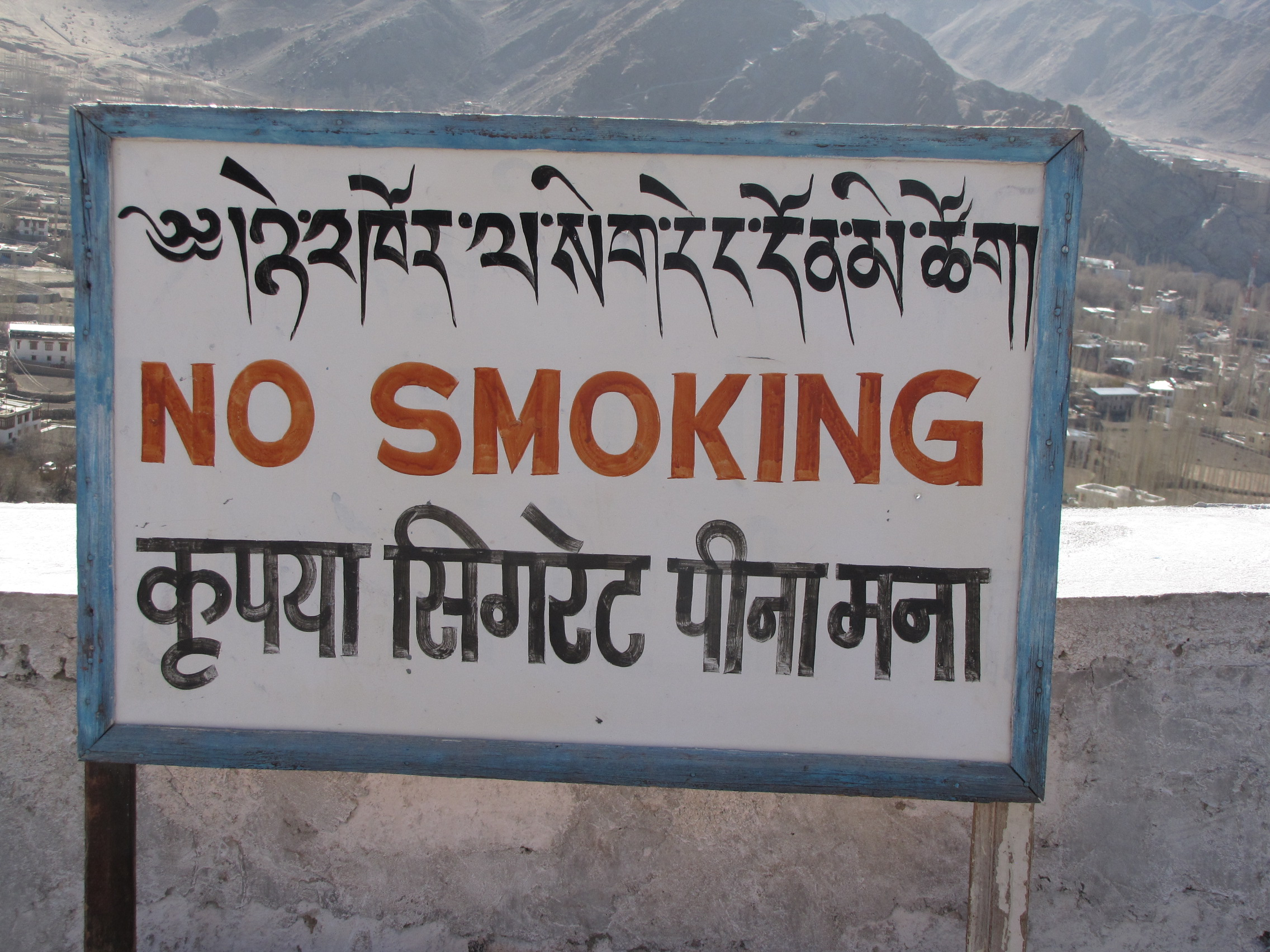 Leh Shanti Stupa